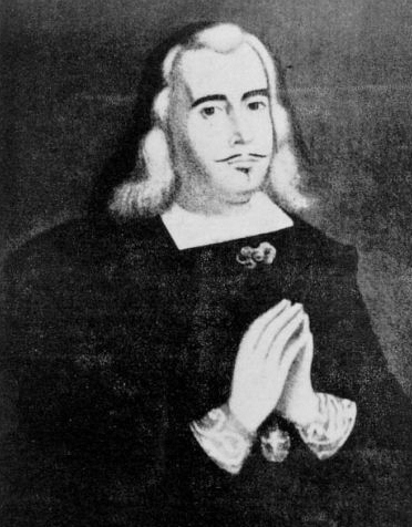 Retrato de Juan de Urdanegui y López de Inoso, primer Marqués de Villafuerte (Colegio de los Jesuitas, Orduña)